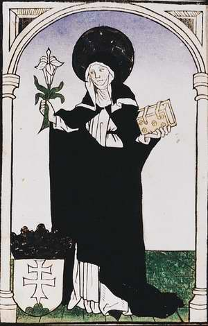 Princesa Santa Margarita de Hungría